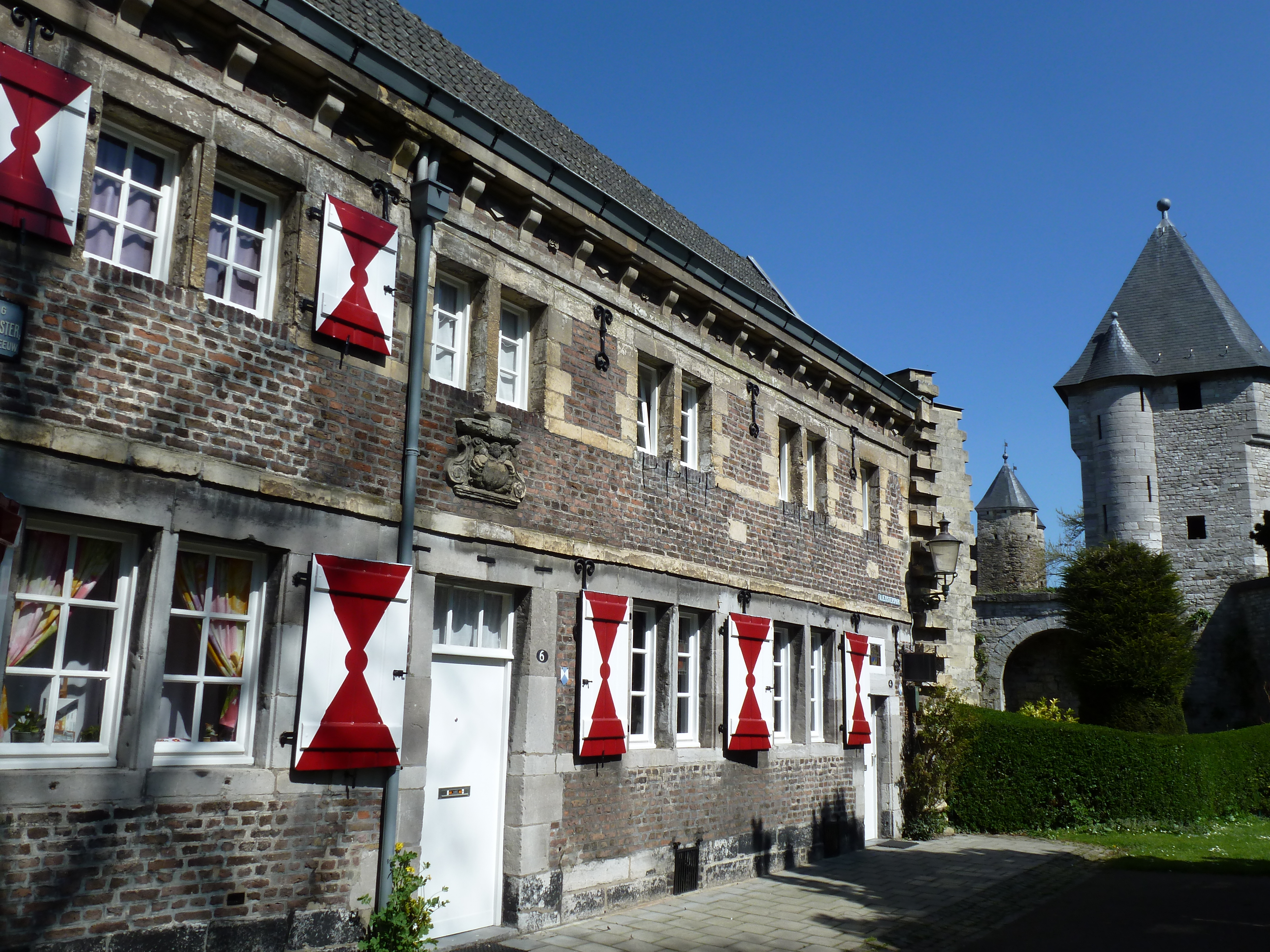 Voormalig feilzustersklooster St Catharinadal